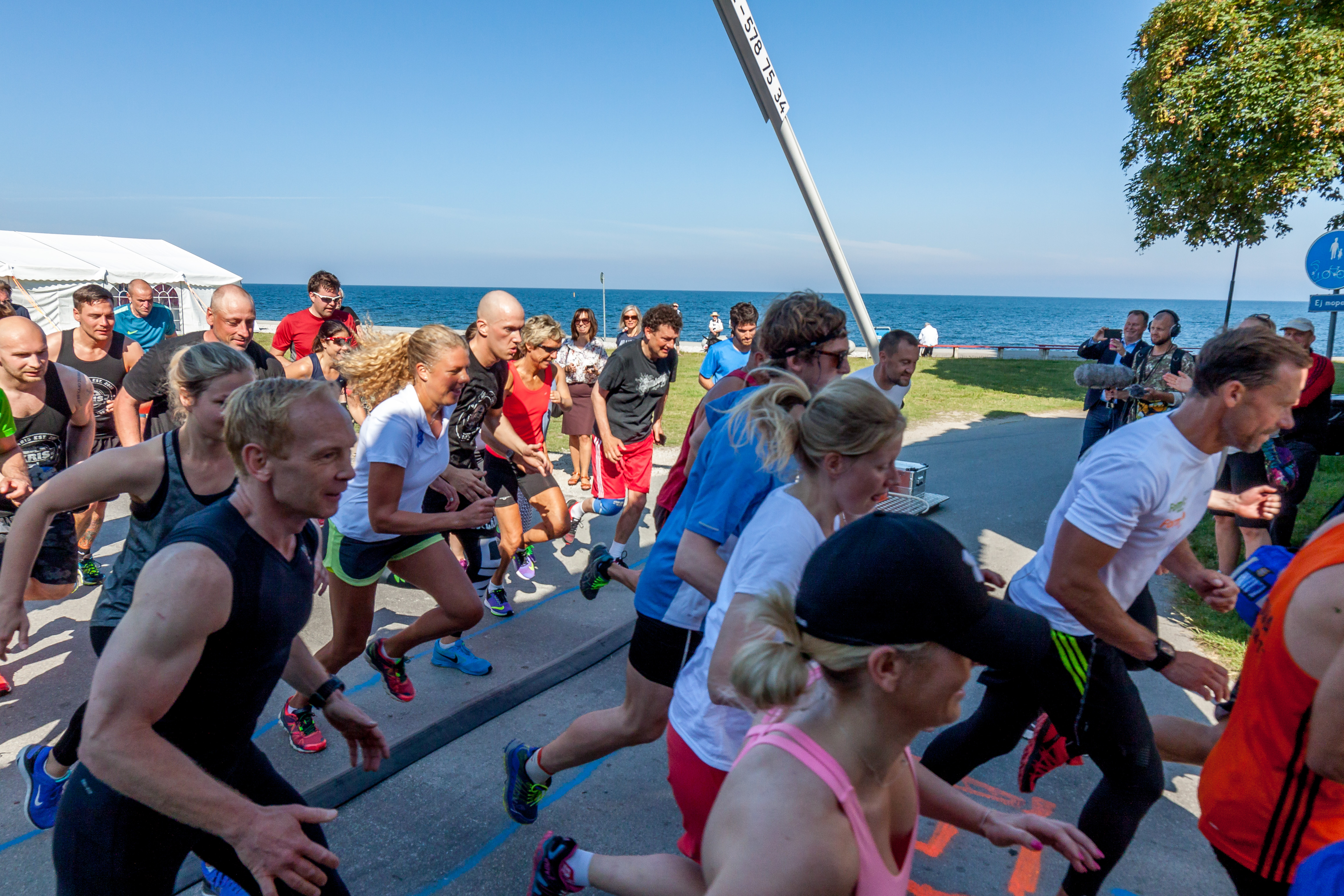 SÄPO joggen 2015 i Almedalen, Visby, Gotland.